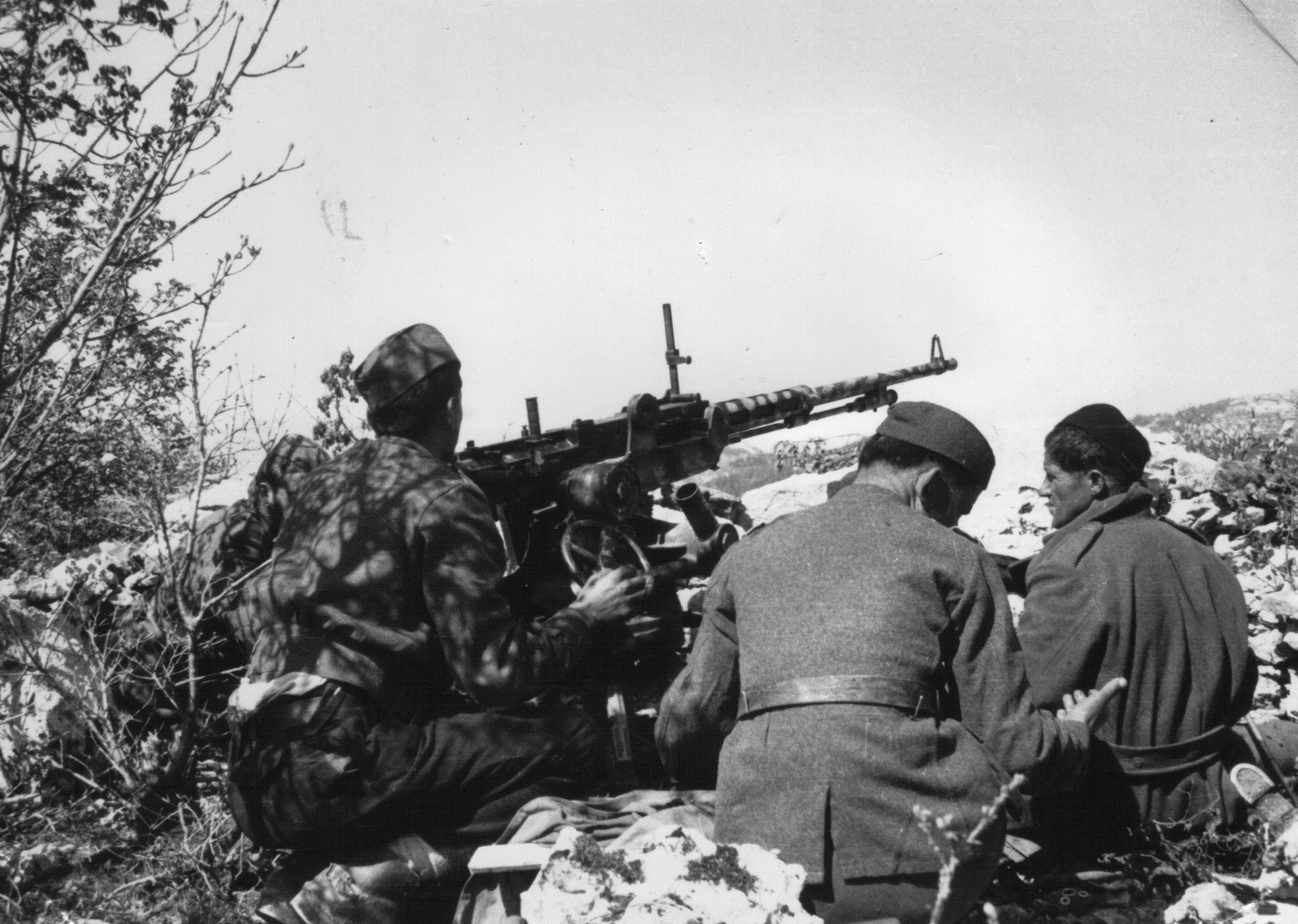 Borbe za Trst in Slovensko primorje